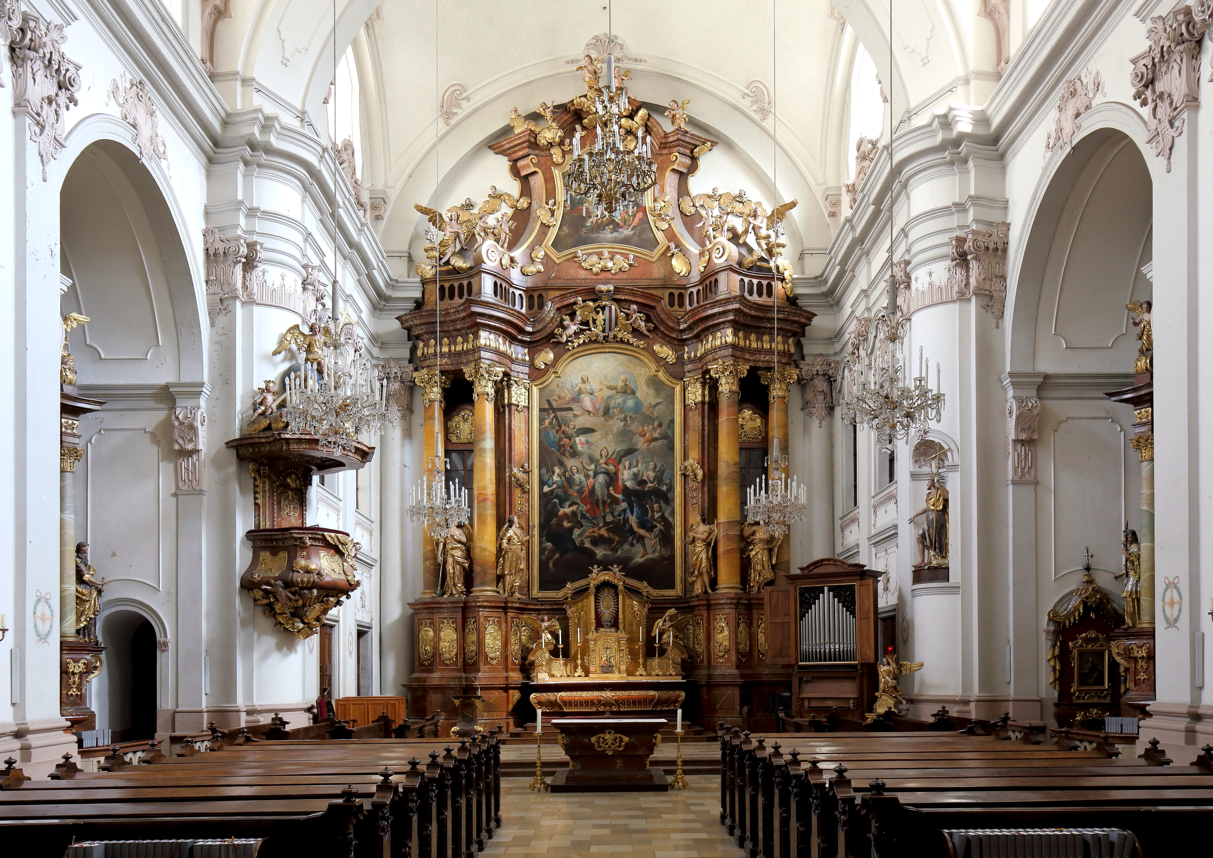 Innenansicht Richtung Hochaltar der Ursulinenkirche in Linz. Das Hochaltarbild stellt den hl. Michael dar und ist ein Werk von Martino Altomonte aus dem Jahr 1738.